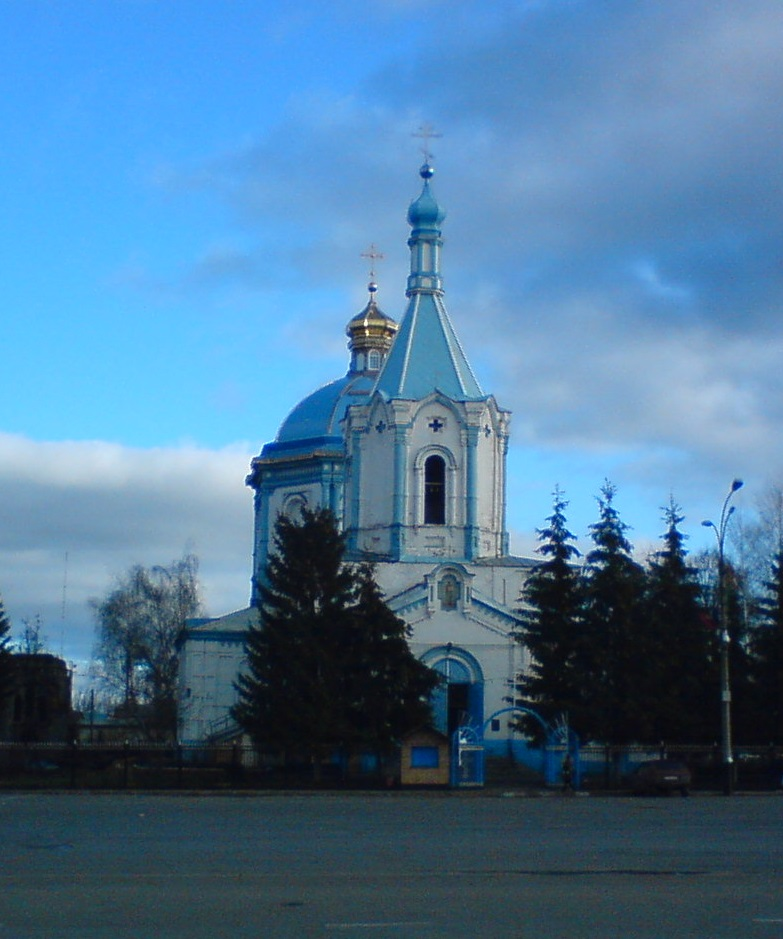 Церковь Иоанна Богослова (2008г.)